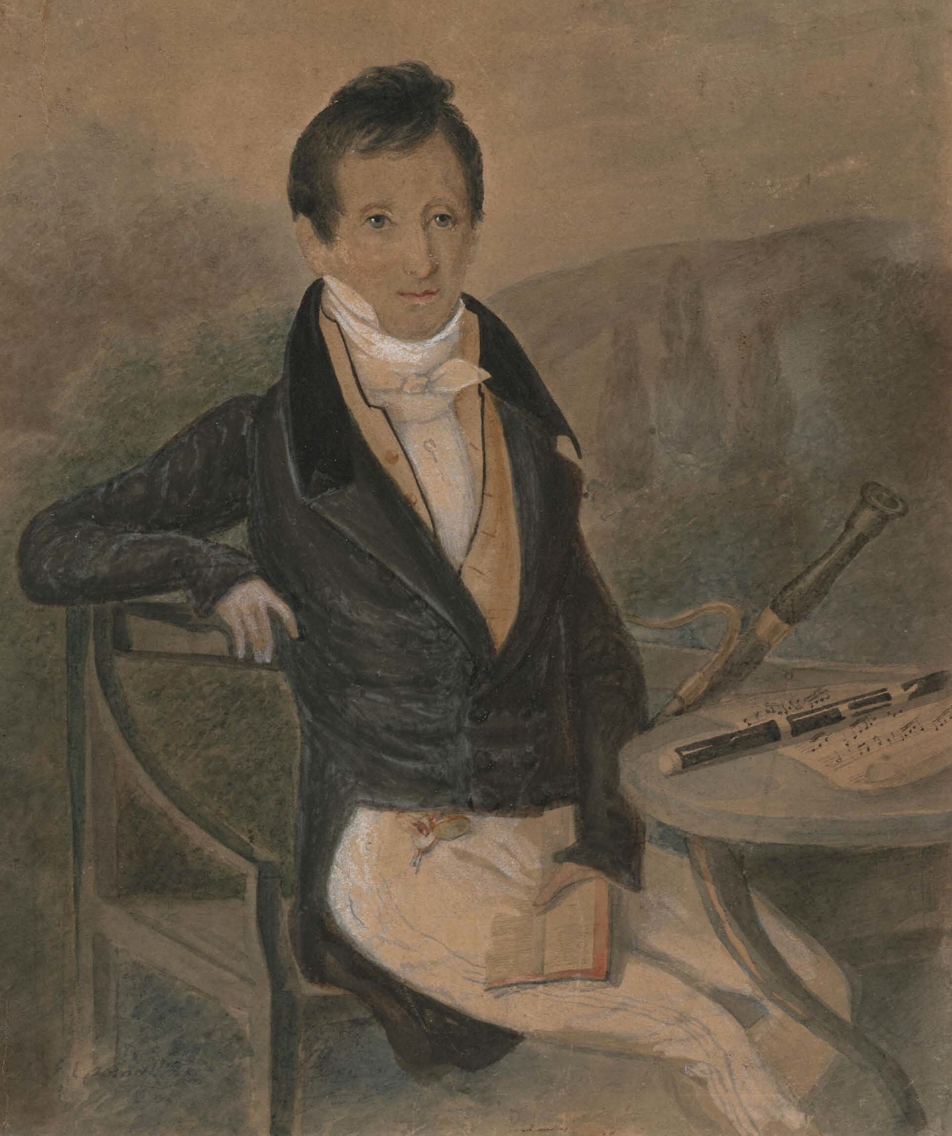 Ritratto di anonimo del flautista francese Jean Louis Tulou (tratto da Harold Reeves, Books and Music, Londra 1931).